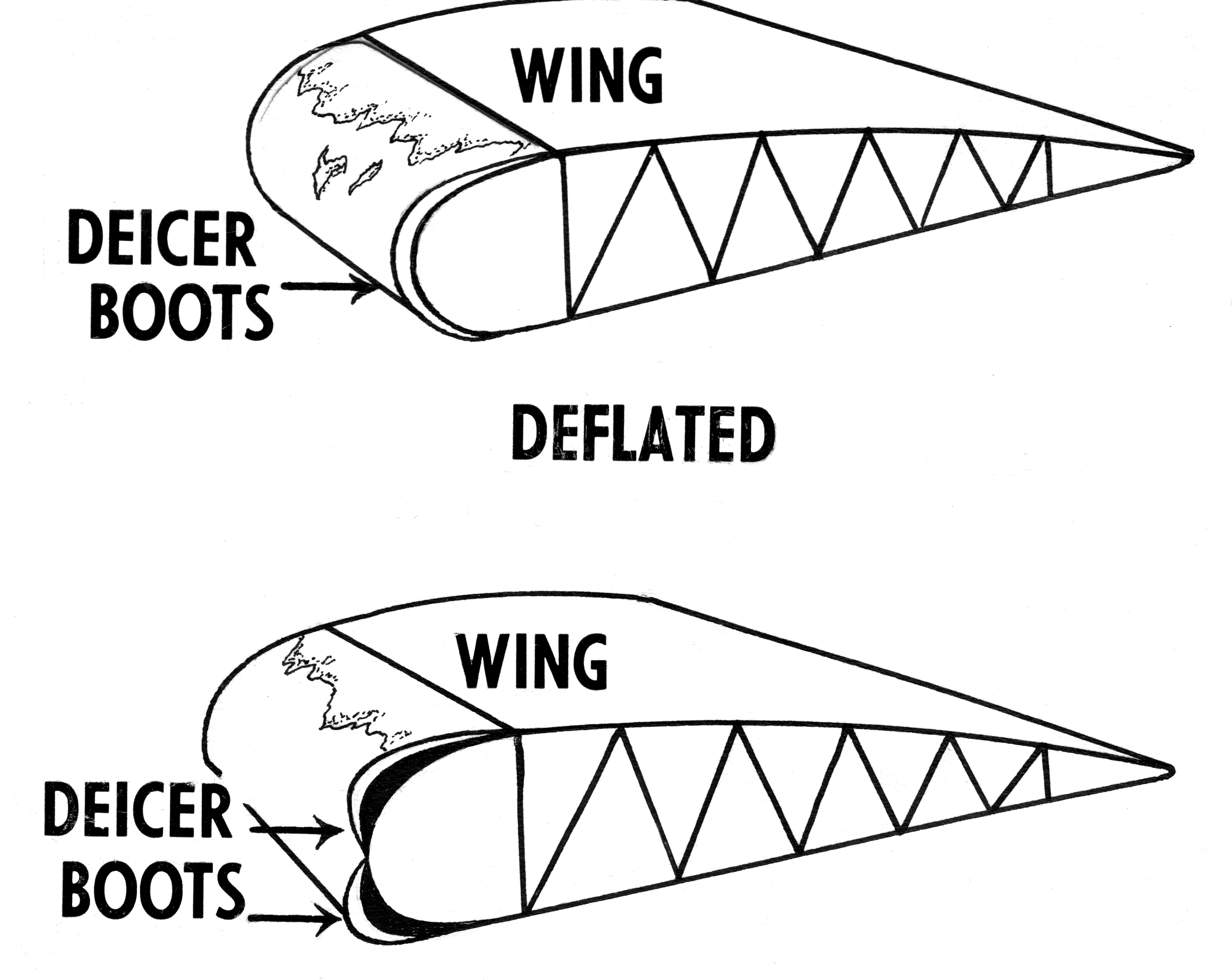 Deicer